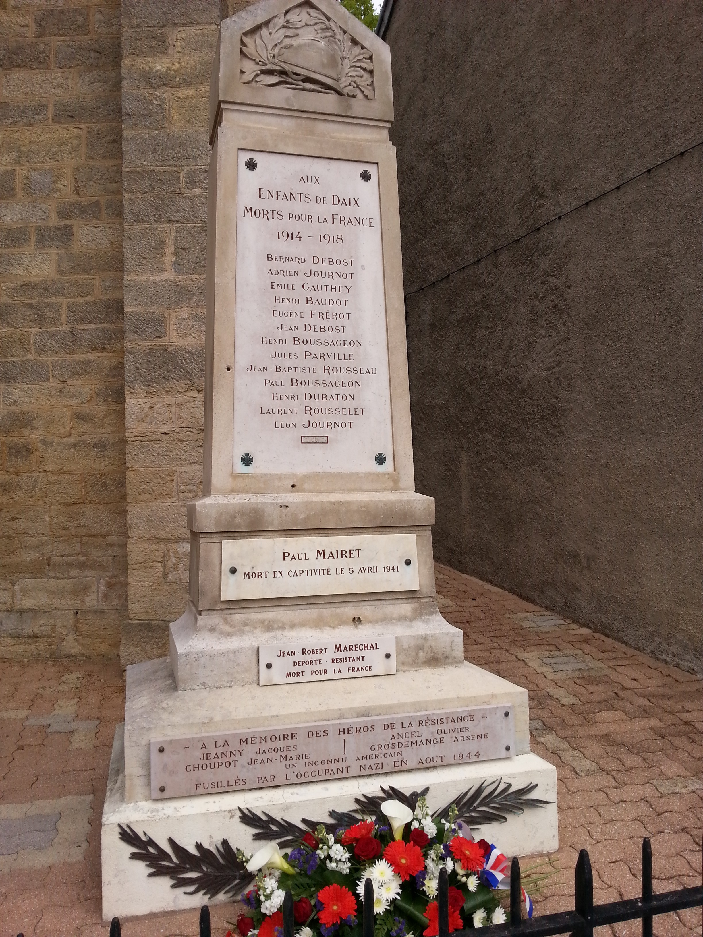 dédié aux victimes des première et deuxième guerres mondiales